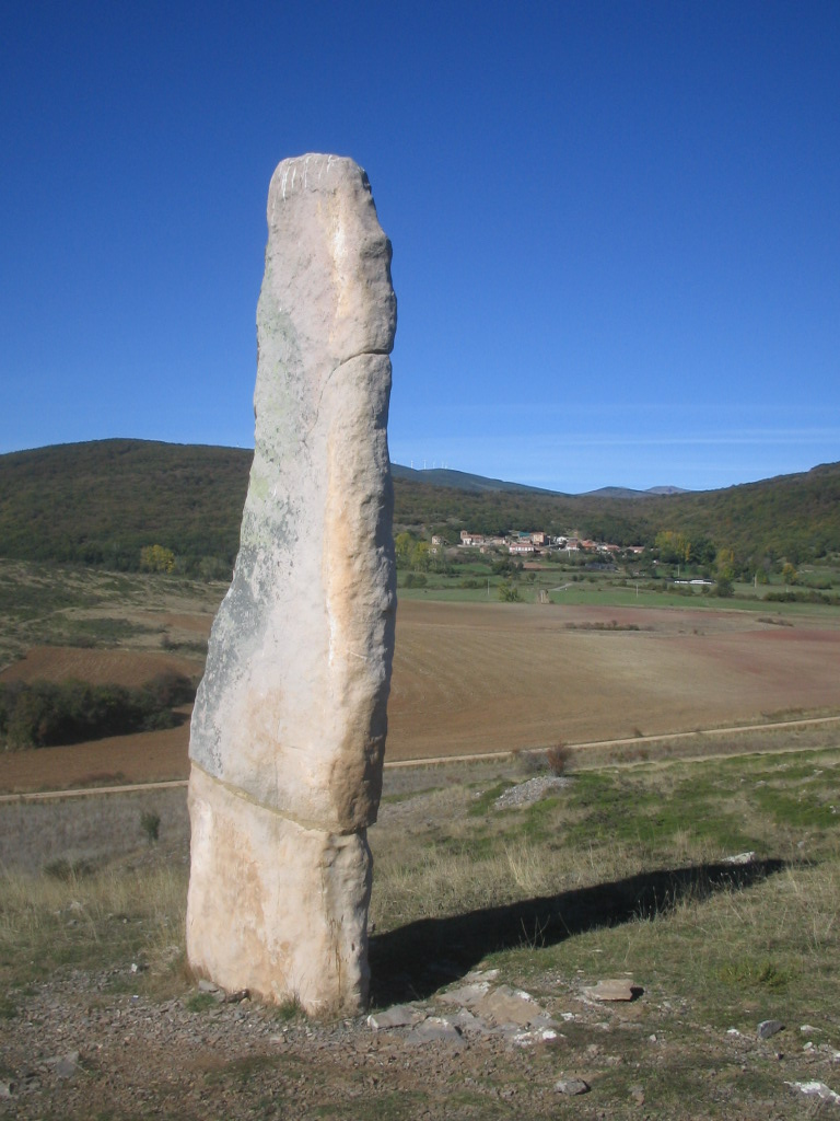 Menhir prehistórico, llamado El Cabezudo, en Valdeolea (Cantabria). Mide 4,85 metros de alto. El pueblo de Las Quintanillas al fondo.